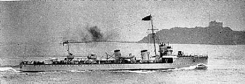 HMS Oak (1912)